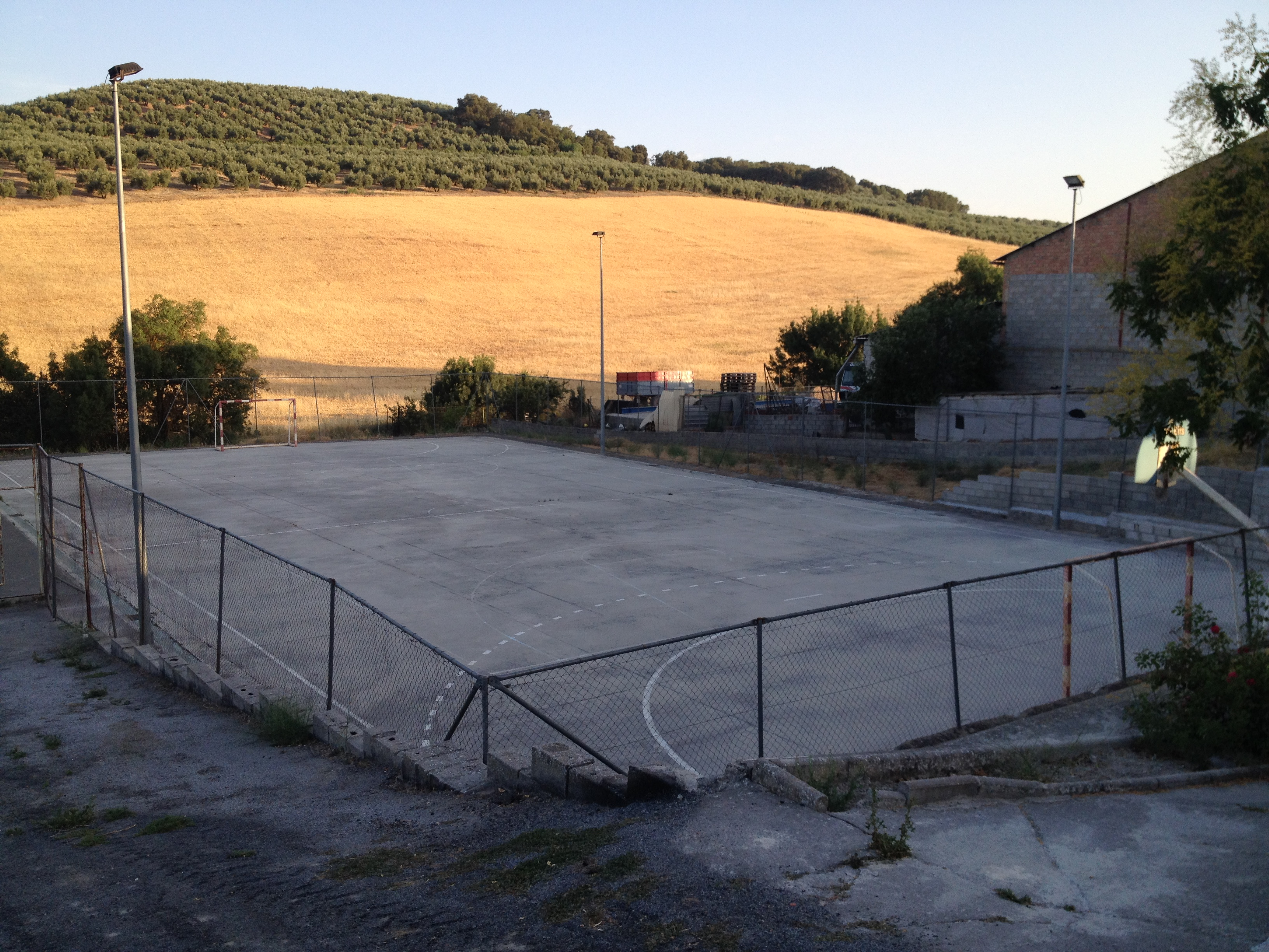 Fotografía de la pista polideportiva de Venta de Agramaderos (Jaén).